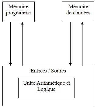 Architecture Harvard, création personelle